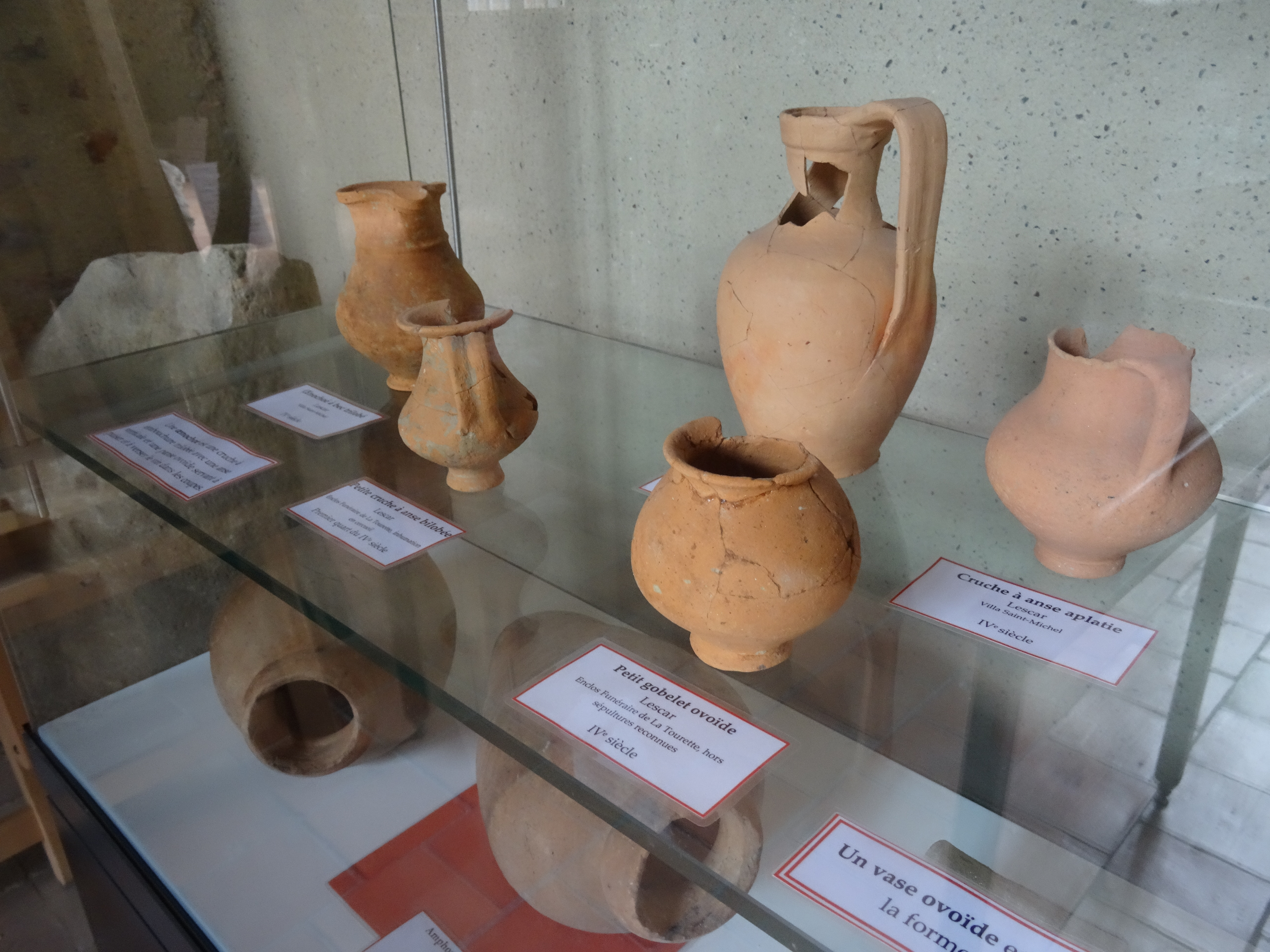 Objets antiques découvert lors de fouilles archéologiques à Lescar